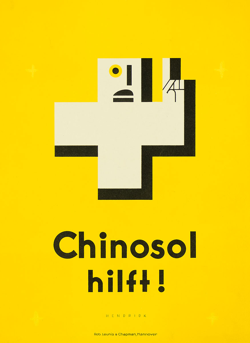 Plakat „Chinosol hilft!“ nach Entwurf des Werbegrafikers Fred Hendriok als farbige Lithographie in den Maßen35 x 25,2 cm hergestellt von der Druckerei Robert Leunis & Chapman